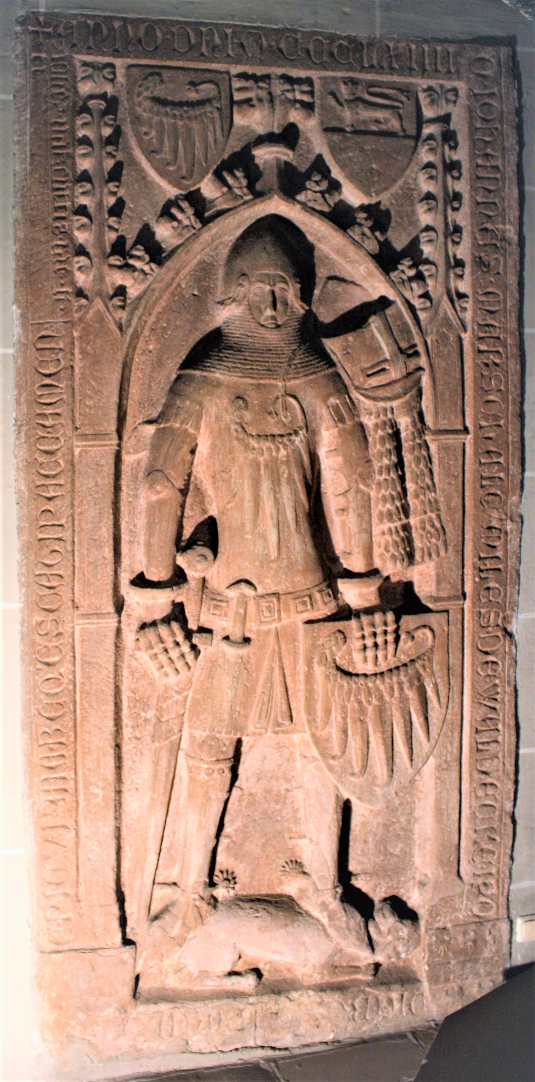 Epitaph: Johann III. Marschall v. Waldeck in der St. Martinkirche in Lorch Rhg aus rotem Sandstein entstanden 1364. Inschrift: ANNO D(OMI)NI M CCC LXIIII O(BIIT) JOHANNES MARSCHALL(VS) MILES DE WALDECKE IP(S)O DIE BONIFACII E(PISCO)PI CVI(VS) A(N)I(M)A REQ(VI)ESCAT I(N) PACE AMEN Wappen: oben optisch links Marschall von Waldeck, rechts von Steinkallenfels; unten optisch links Brömser von Rüdesheim, rechts Stumpf von Waldeck[1][2] ↑ ↑